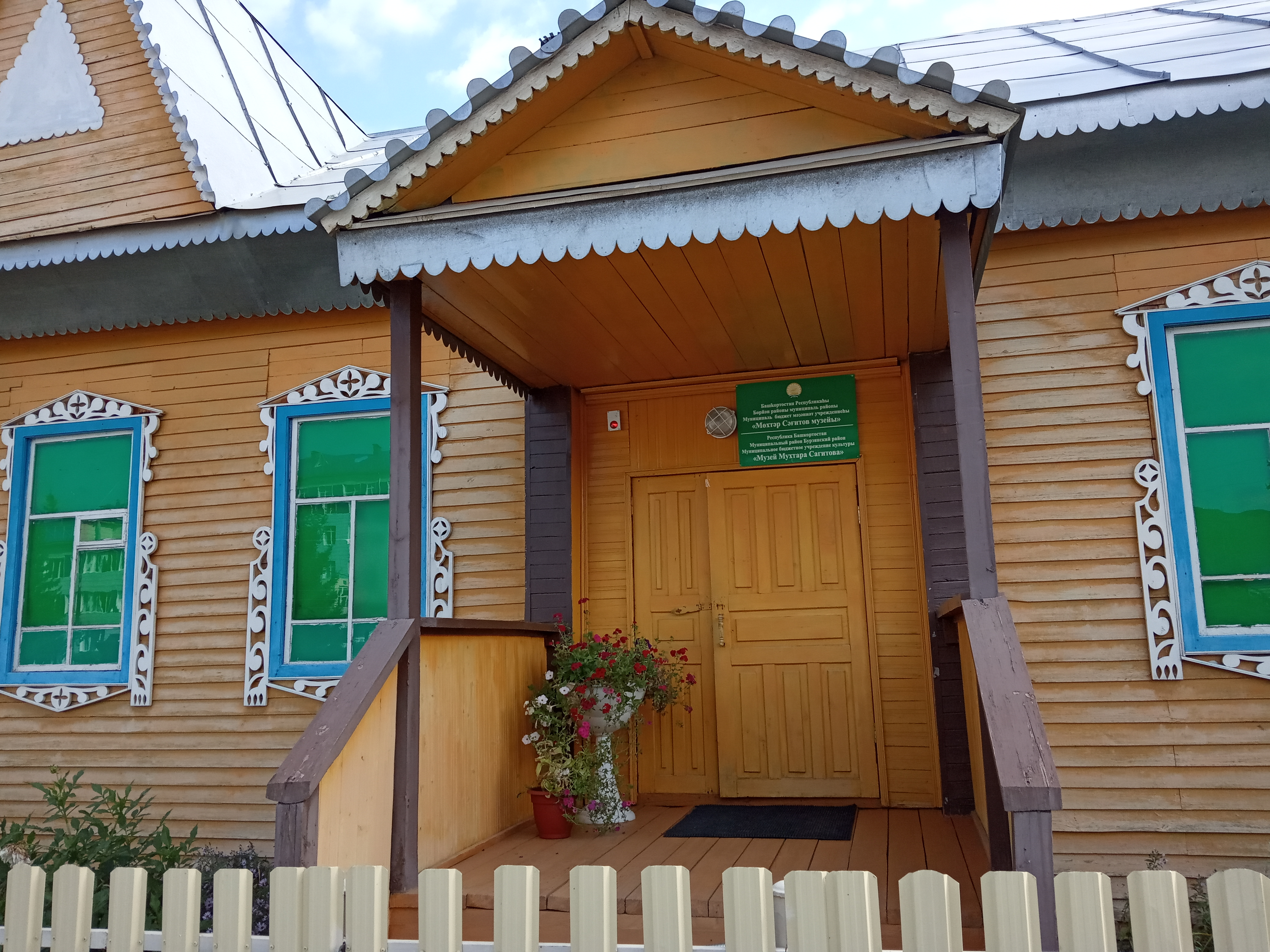 Музей Мухтара Сагитова в селе Старосубхангулово Бурзянского района РБ